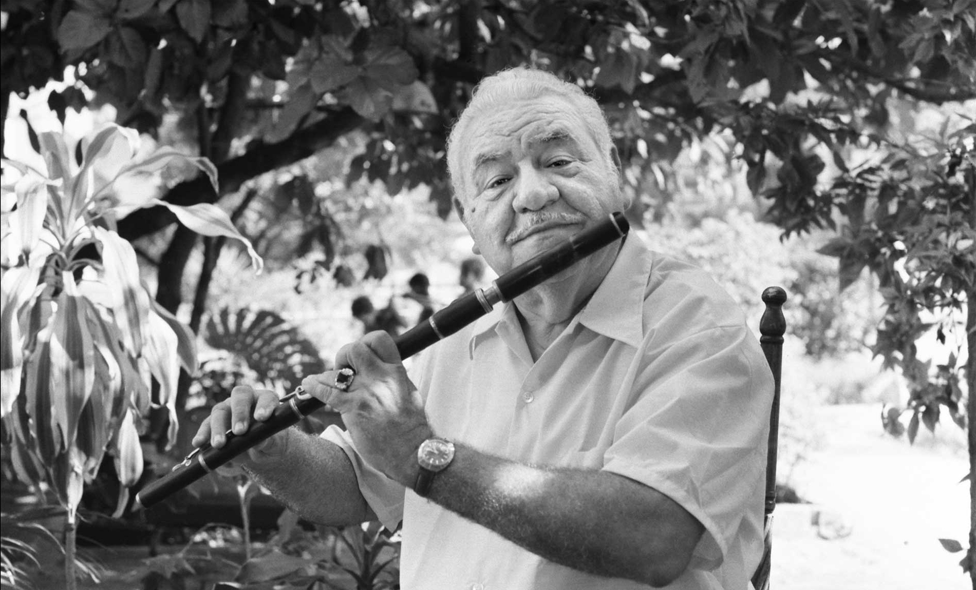 Antonio Arcaño, 1970.